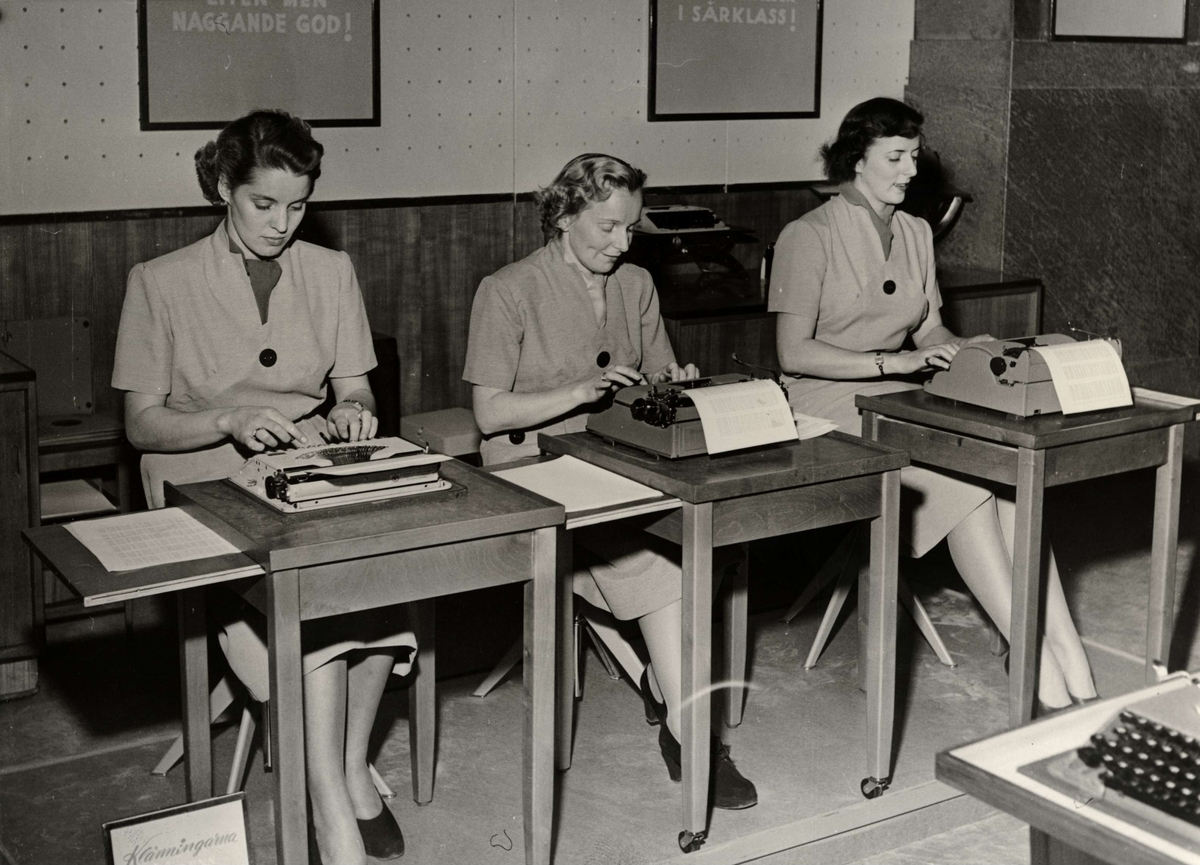 Modellerna visar passande klädesplagg för kontoristen, februari 1952. Tre kvinnor skriver på maskin. Nordiska Kompaniet.